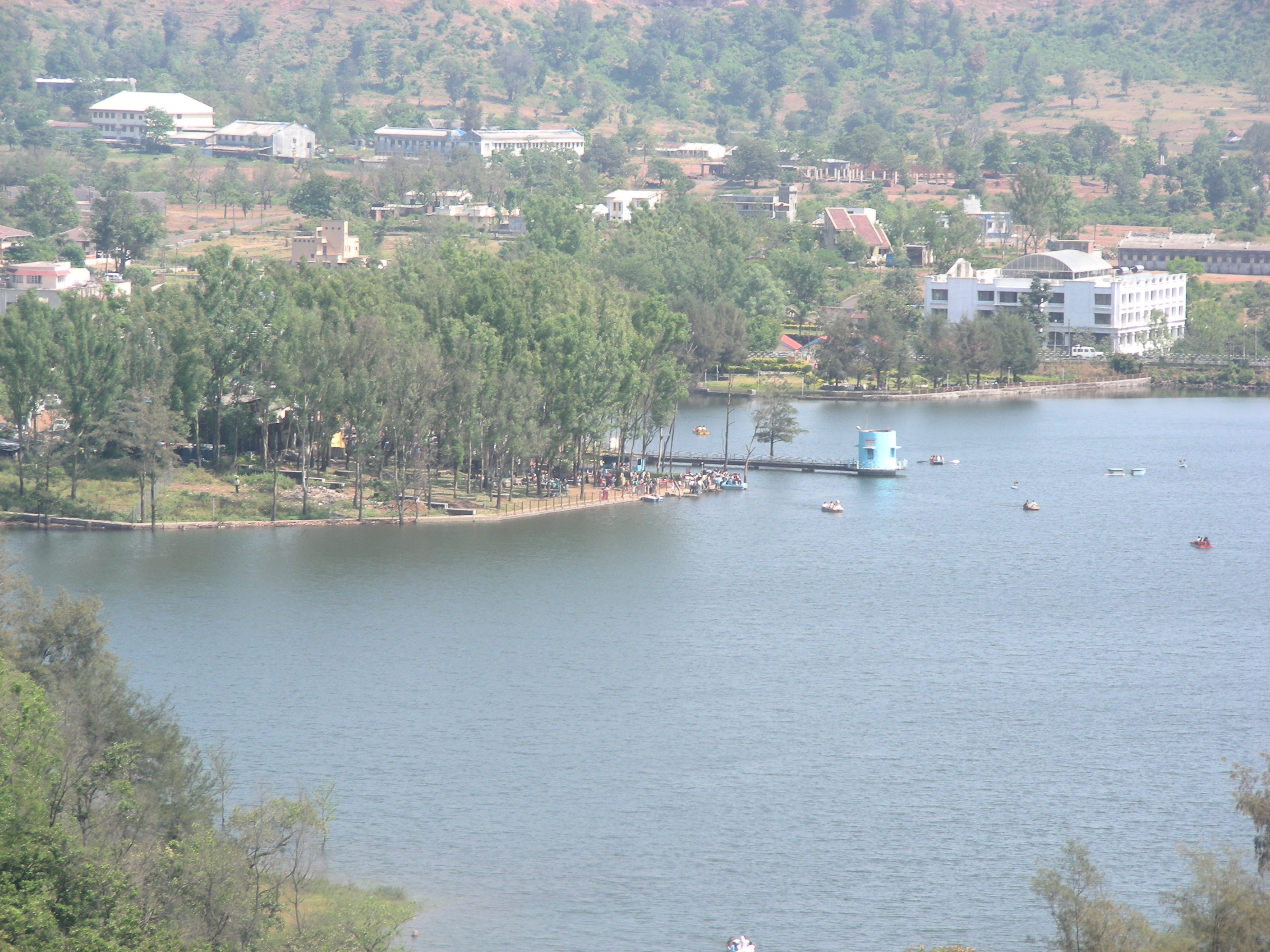 Boating in the Lake at Saputara, Gujarat, India